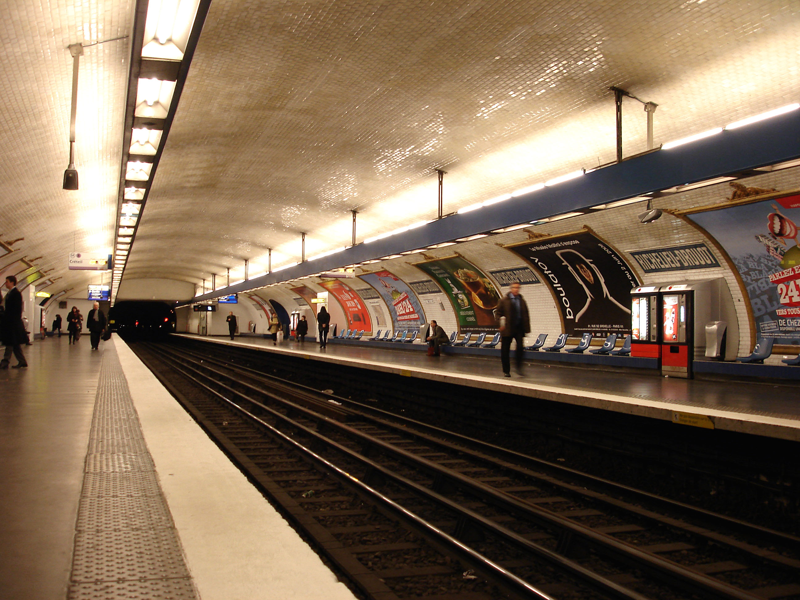 La station Richelieu - Drouot de la ligne 8 du métro de Paris, France